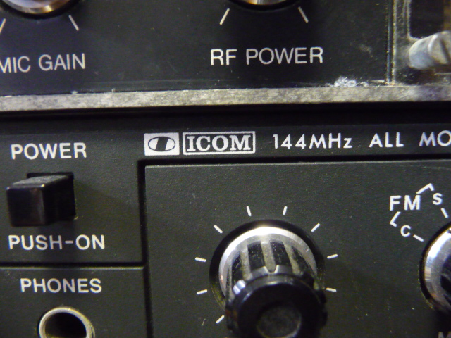 アイコムの旧ロゴマーク